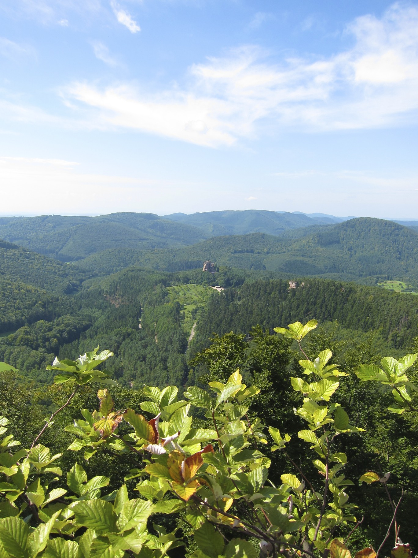 Château de Lœwenstein Parc naturel régional des Vosges du Nord, Alsace, France August 2010